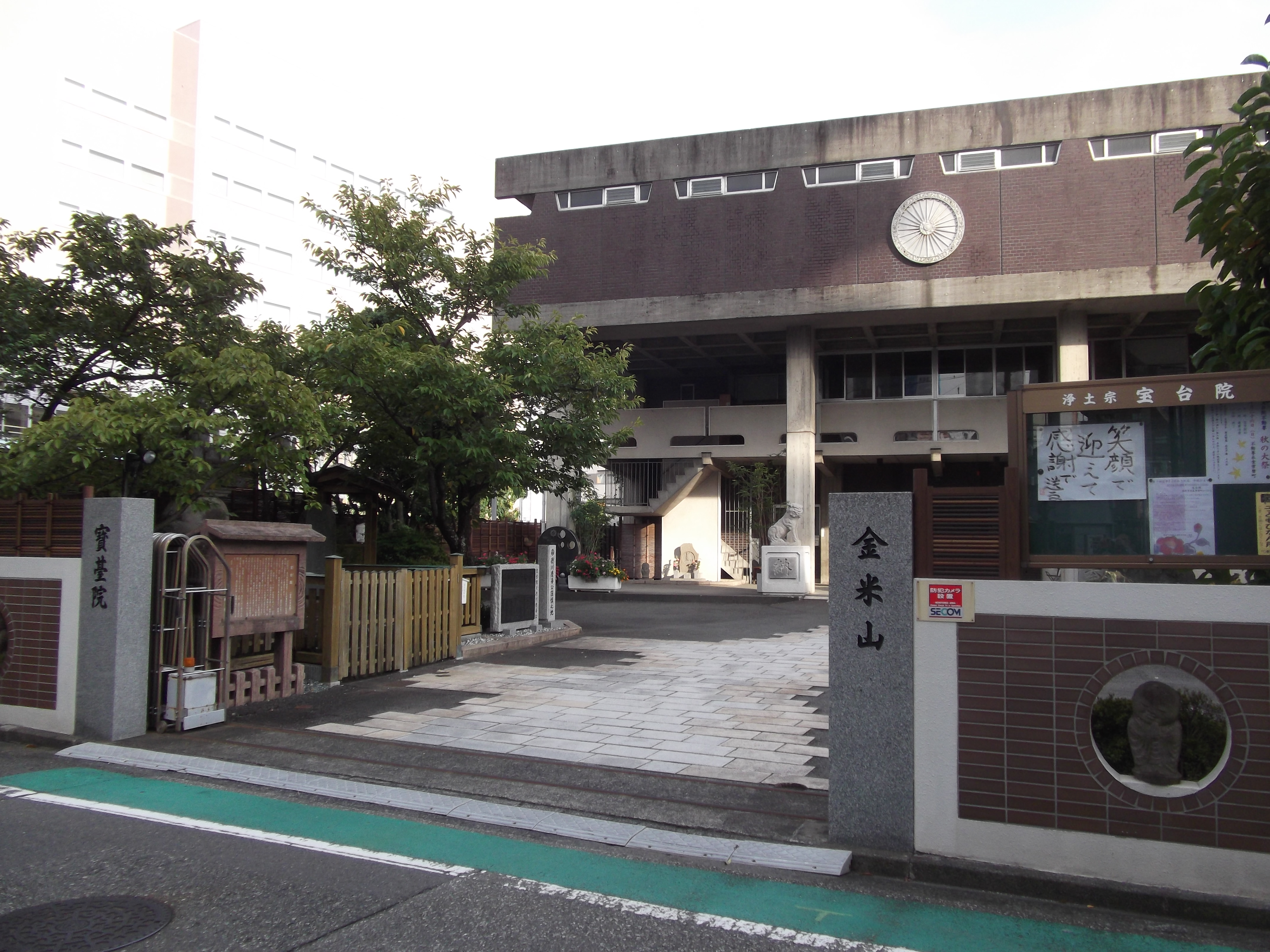 静岡市葵区の宝台院